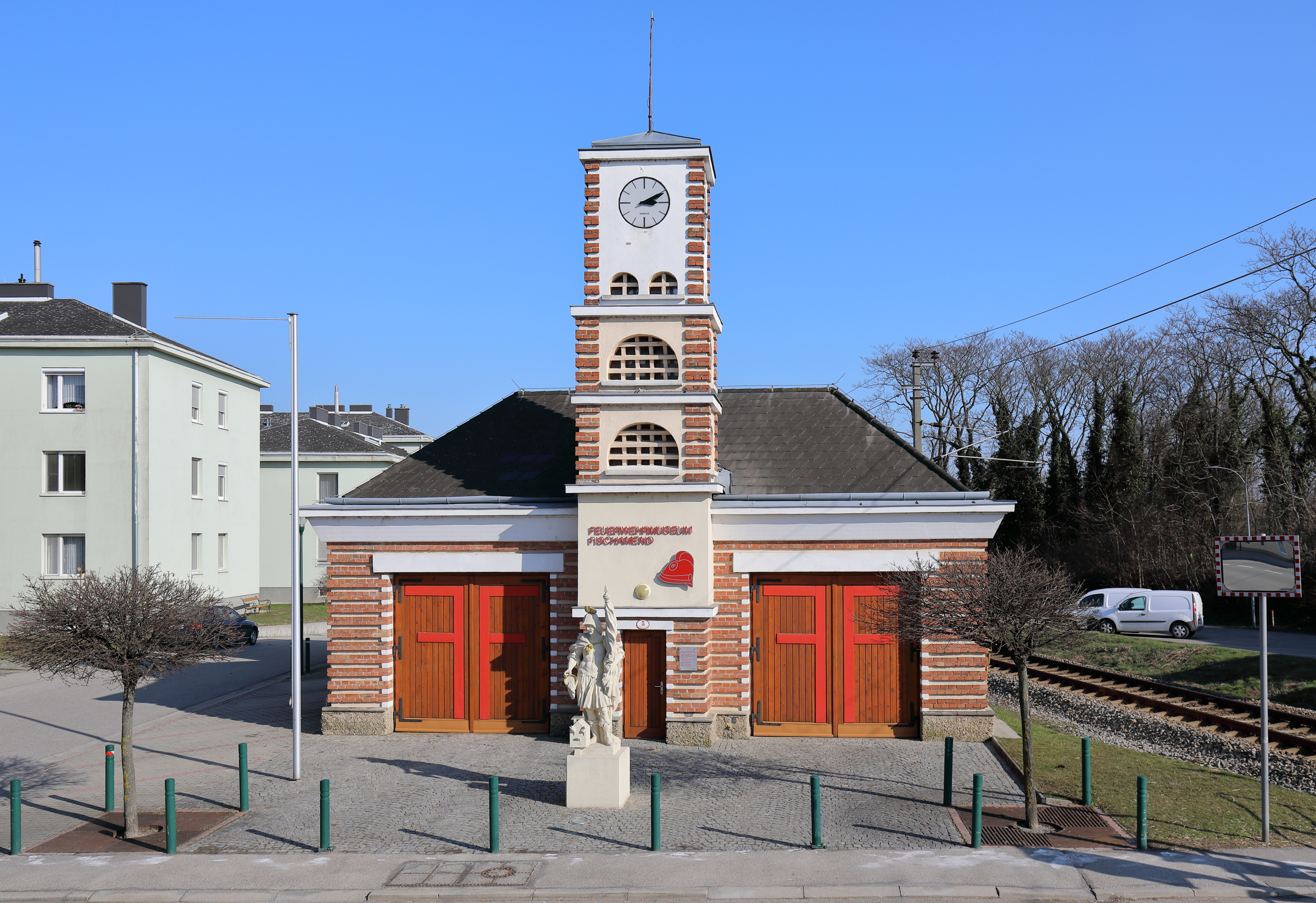 Das ehemalige Feuerwehrhaus der Feuerwehr Fischamend Dorf an der Adresse Klein-Neusiedler Straße 5 in der niederösterreichischen Stadtgemeinde Fischamend und davor eine Florianstatue auf quadratischem Sockel. Das Feuerwehrhaus wurde 1928 nach Plänen der Architekten Robert Kramreiter und Walter Pind errichtet und war bis zur Zusammenführung der Feuerwehren Fischamend Dorf und Fischamend Markt 1992 in Betrieb. 2004 wurde es unter Architekt Peter Marchart saniert und wird seit 2005 als Feuerwehrmuseum genutzt.